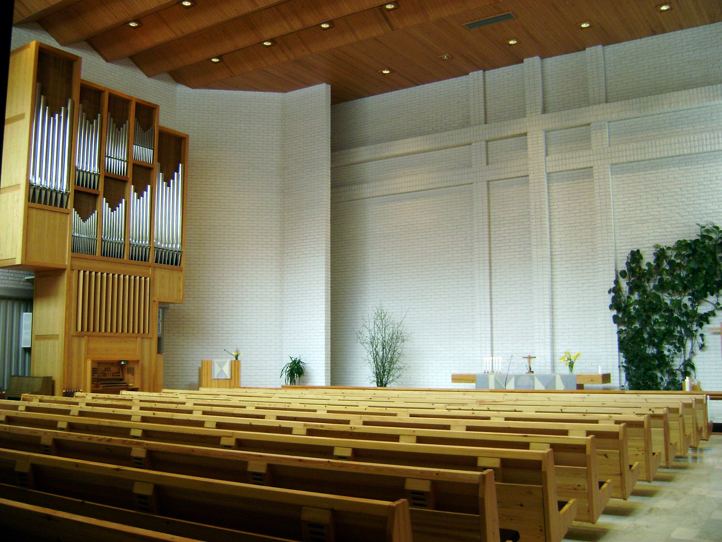 Kallaveden kirkon sali.